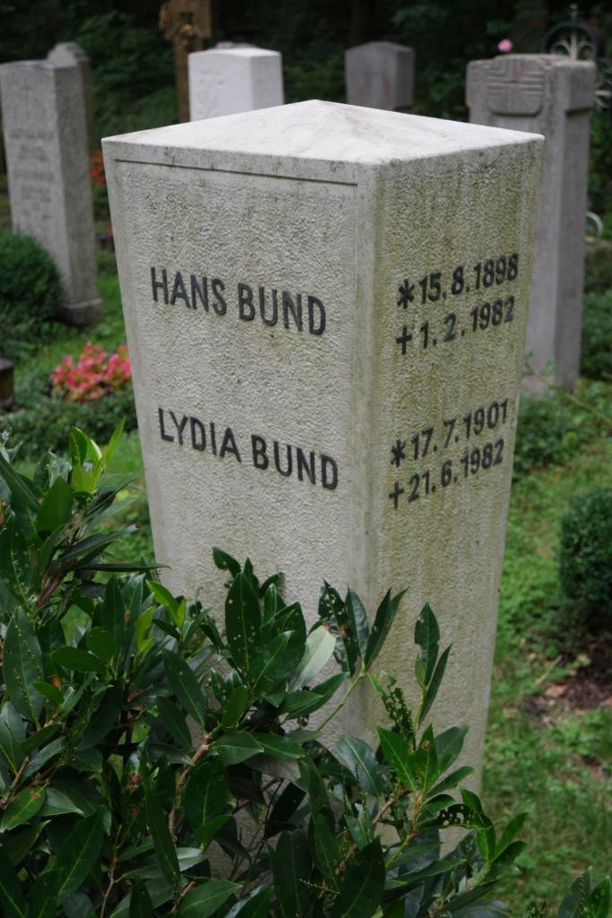 Grab des Komponisten und Kapellmeisters Hans Bund (1898-1982) auf dem Waldfriedhof in München-Solln